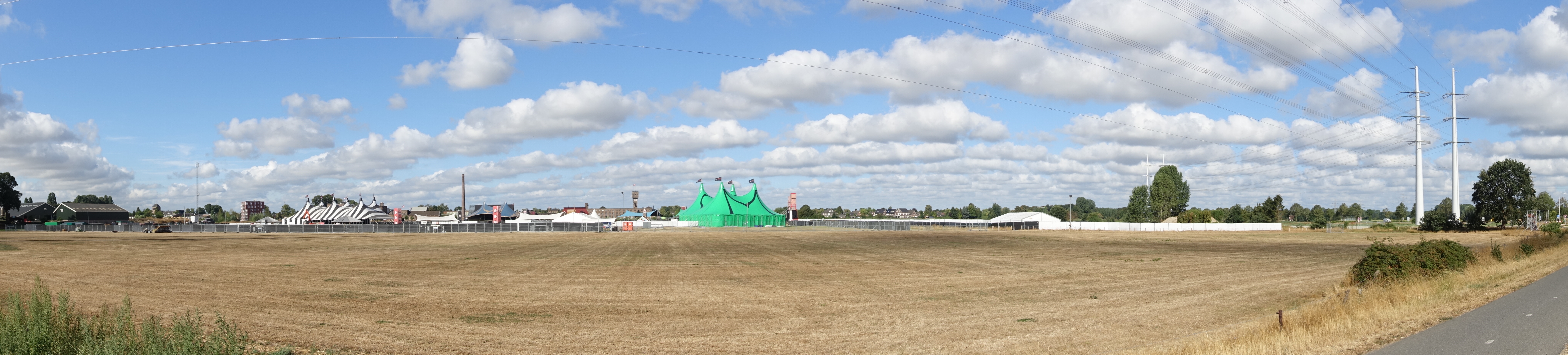 Huntenpop, Veranstaltungsgelände bei Ulft.